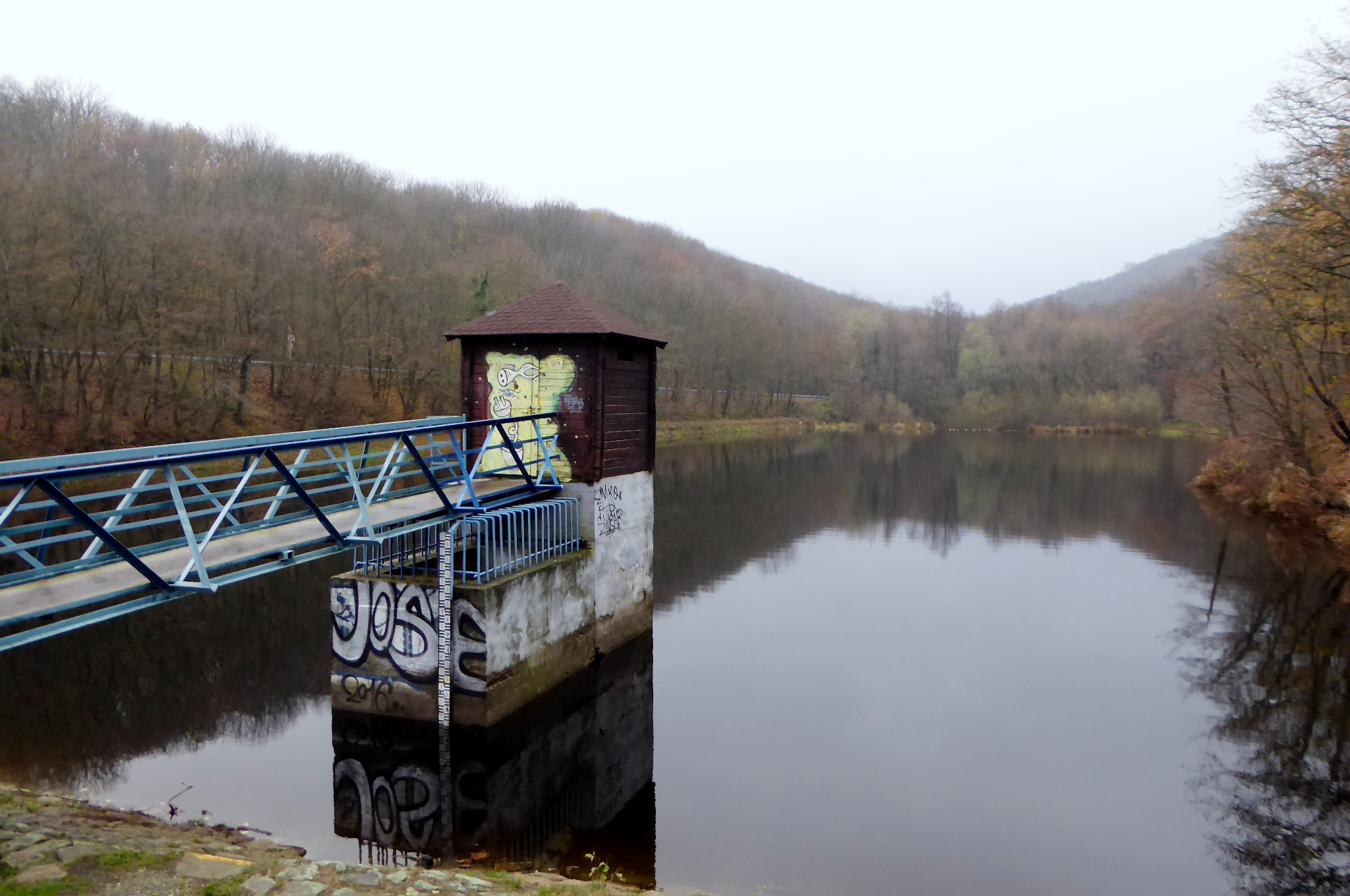 Stausee des Vištucký potok in Harmónia (Modra, SK).